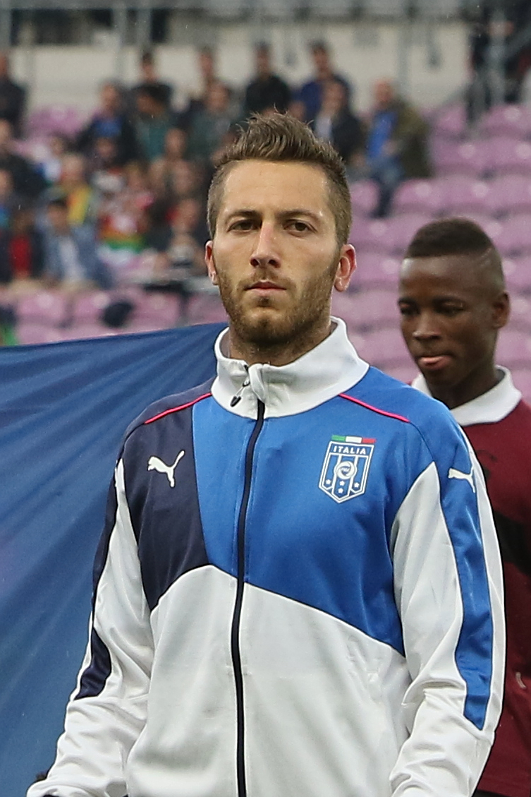 20150616 - Portugal - Italie - Genève - Andrea Bertolacci